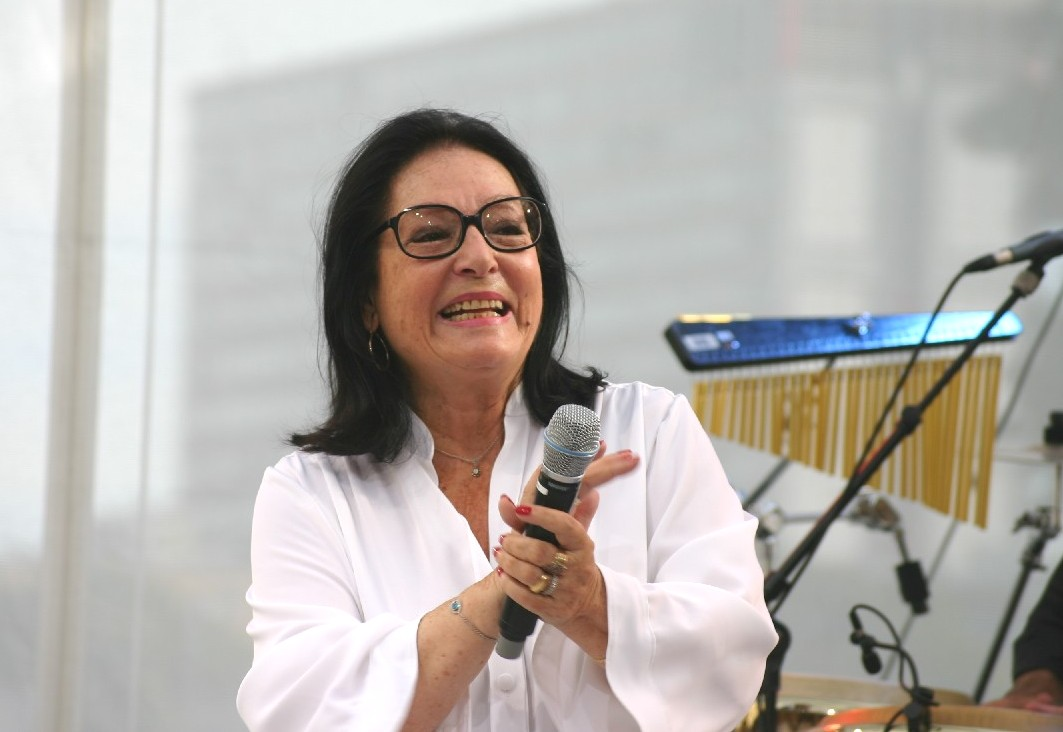 Die Sängerin Nana Mouskouri während eines Konzertes zum Tag der offenen Tür im Berliner Bundesfinanzministerium.